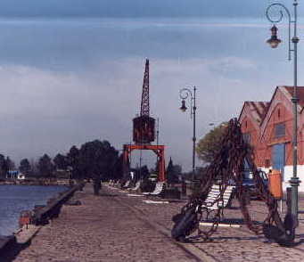 Paseo de la costa en la ciudad de Gualeguaychú